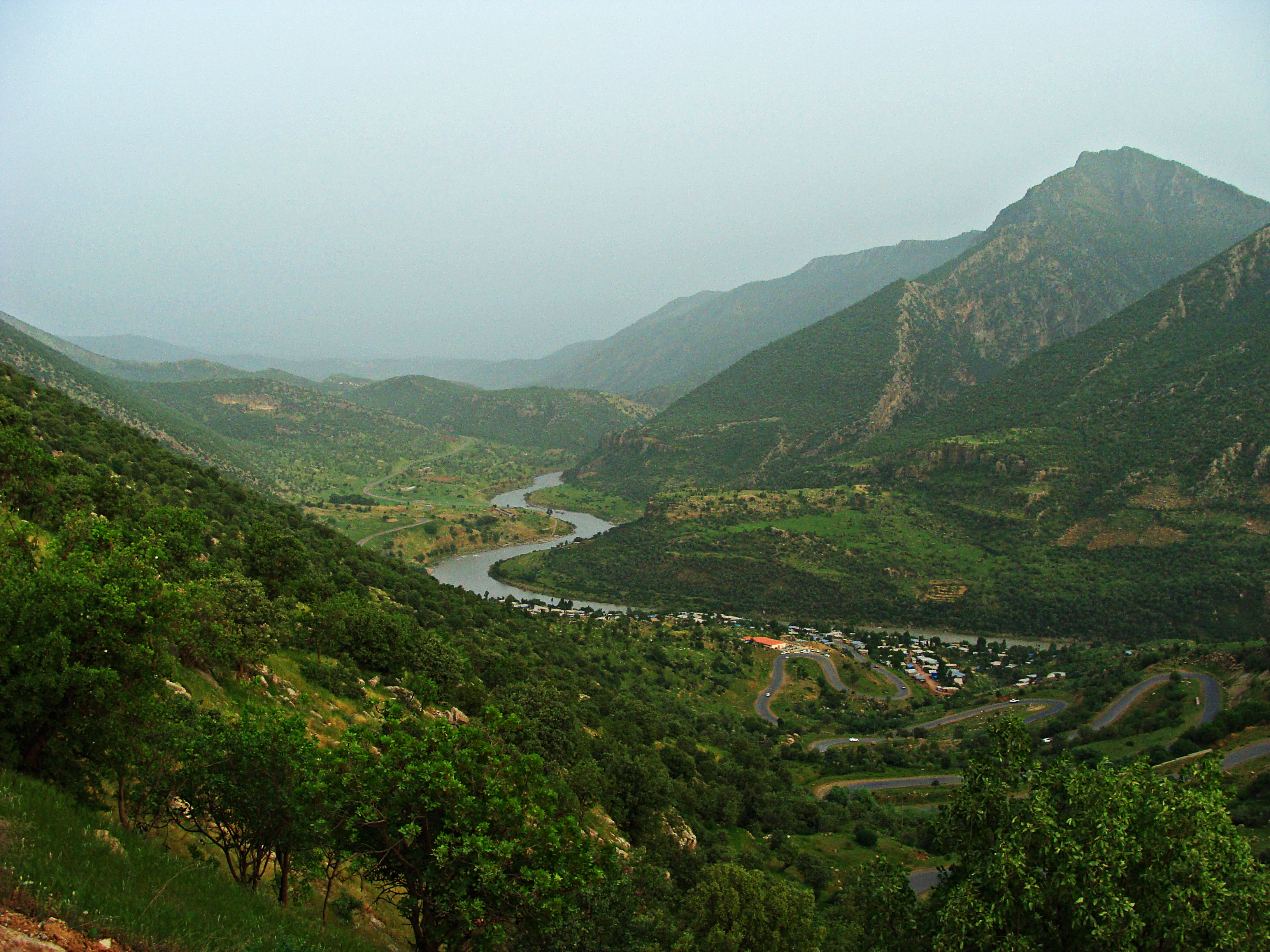 Irak: Großer Zab